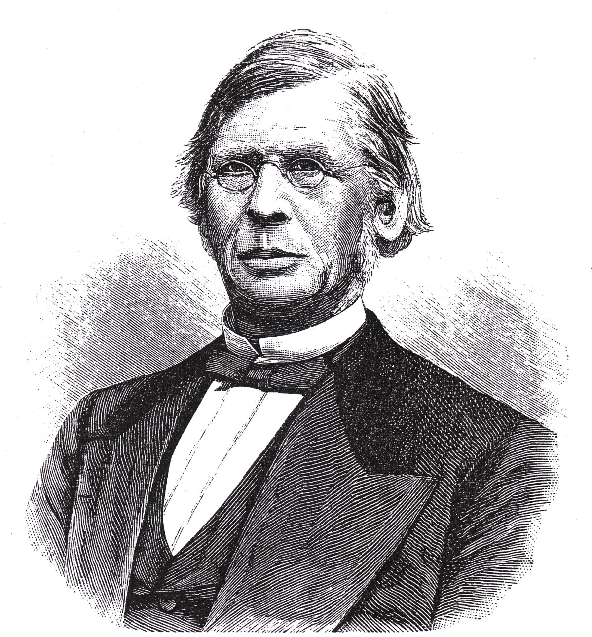 Lithographie von Arthur Breusing